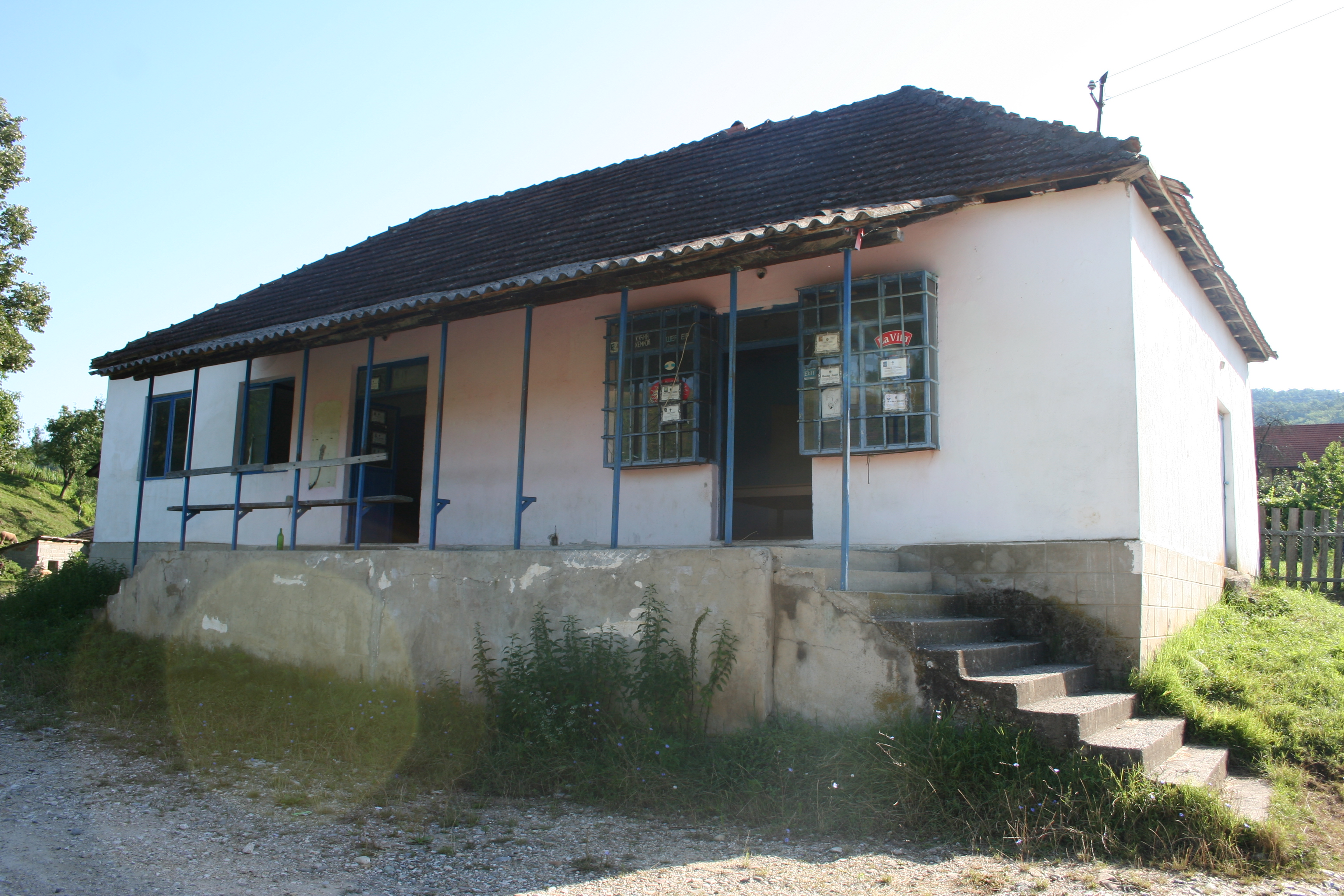 Zgrada MZ, Kamenica